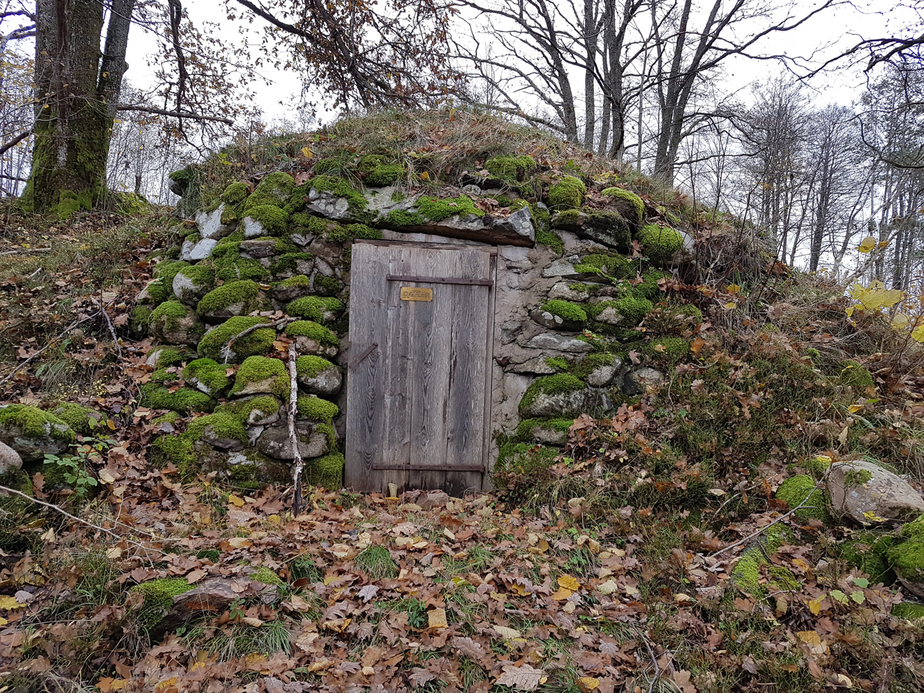 Linbastan vid Stenlia i SImlångsdalens socken som sedan 1957 innehaves av Breareds Kulturhistoriska Förening